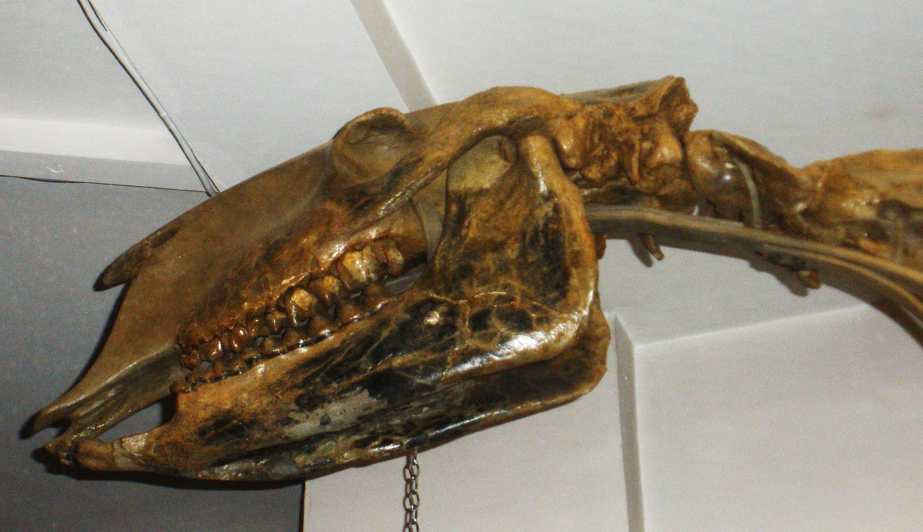 Fossil of Moropus, an extinct mammal -- Took the photo at Natural History Museum, London